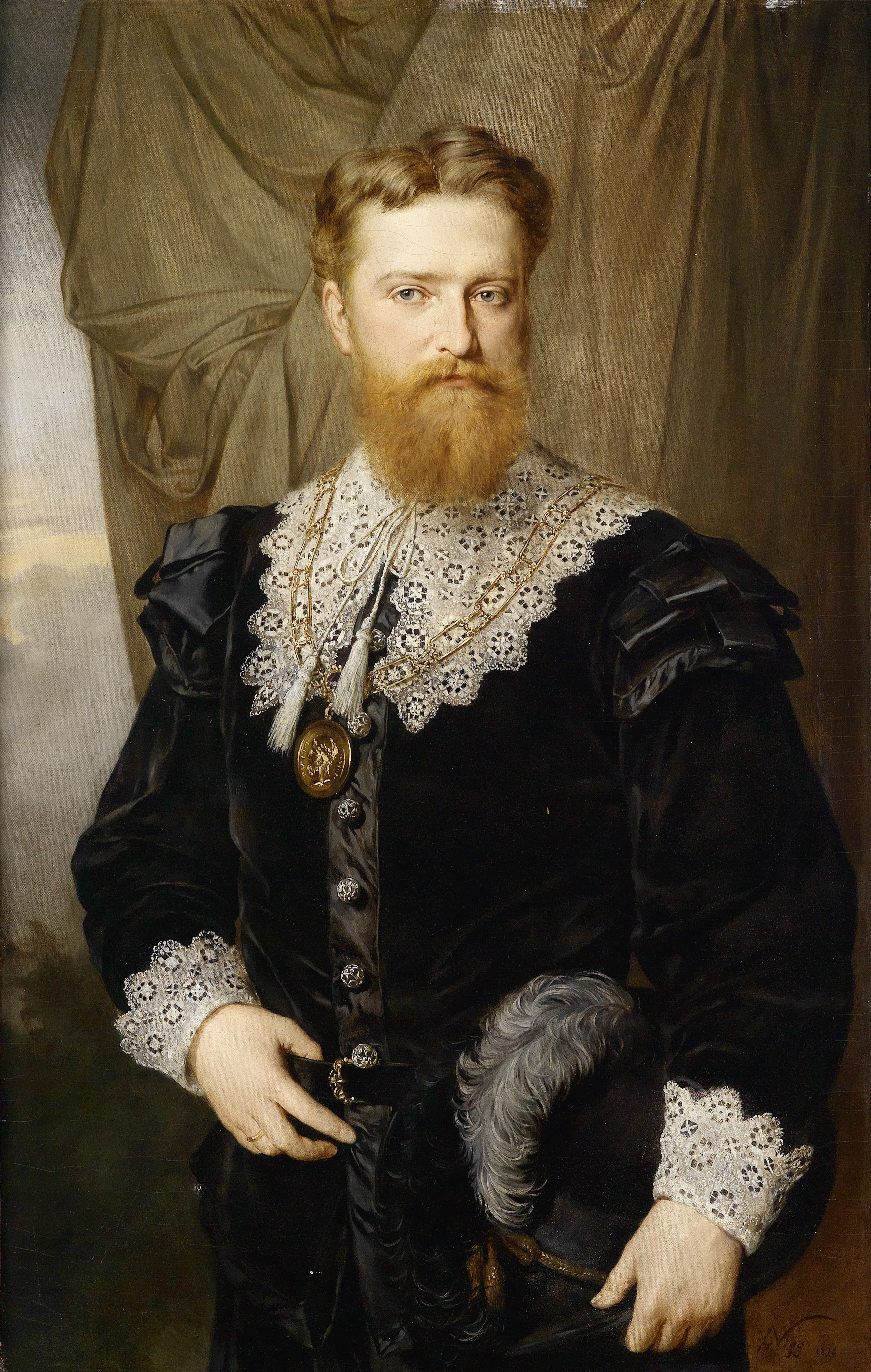 Bildnis des Karl Lueger (1844-1910) in historischem Kostüm und mit Gnadenmedaille